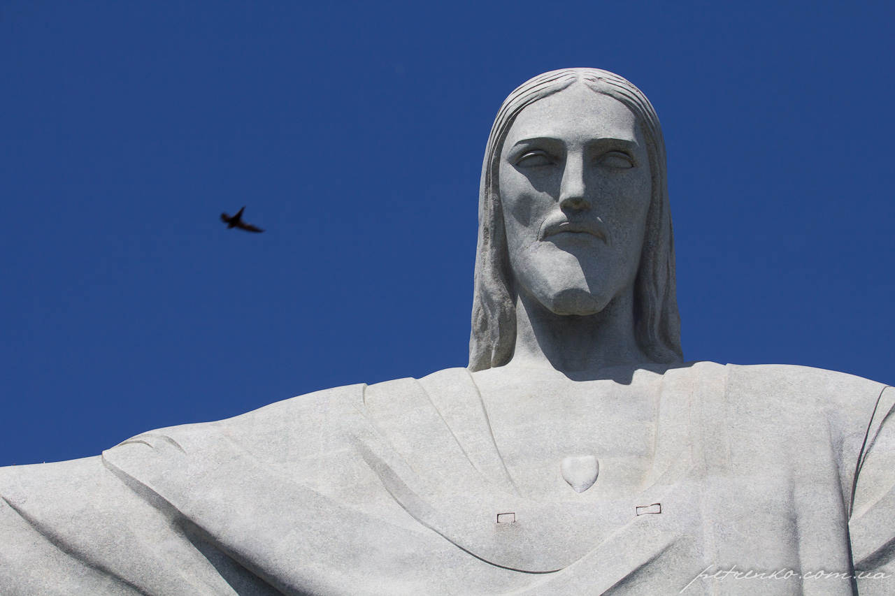 Santa Teresa, Rio de Janeiro - State of Rio de Janeiro, Brazil